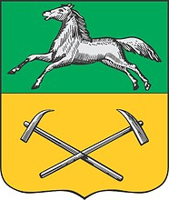 Герб города Прокопьевск